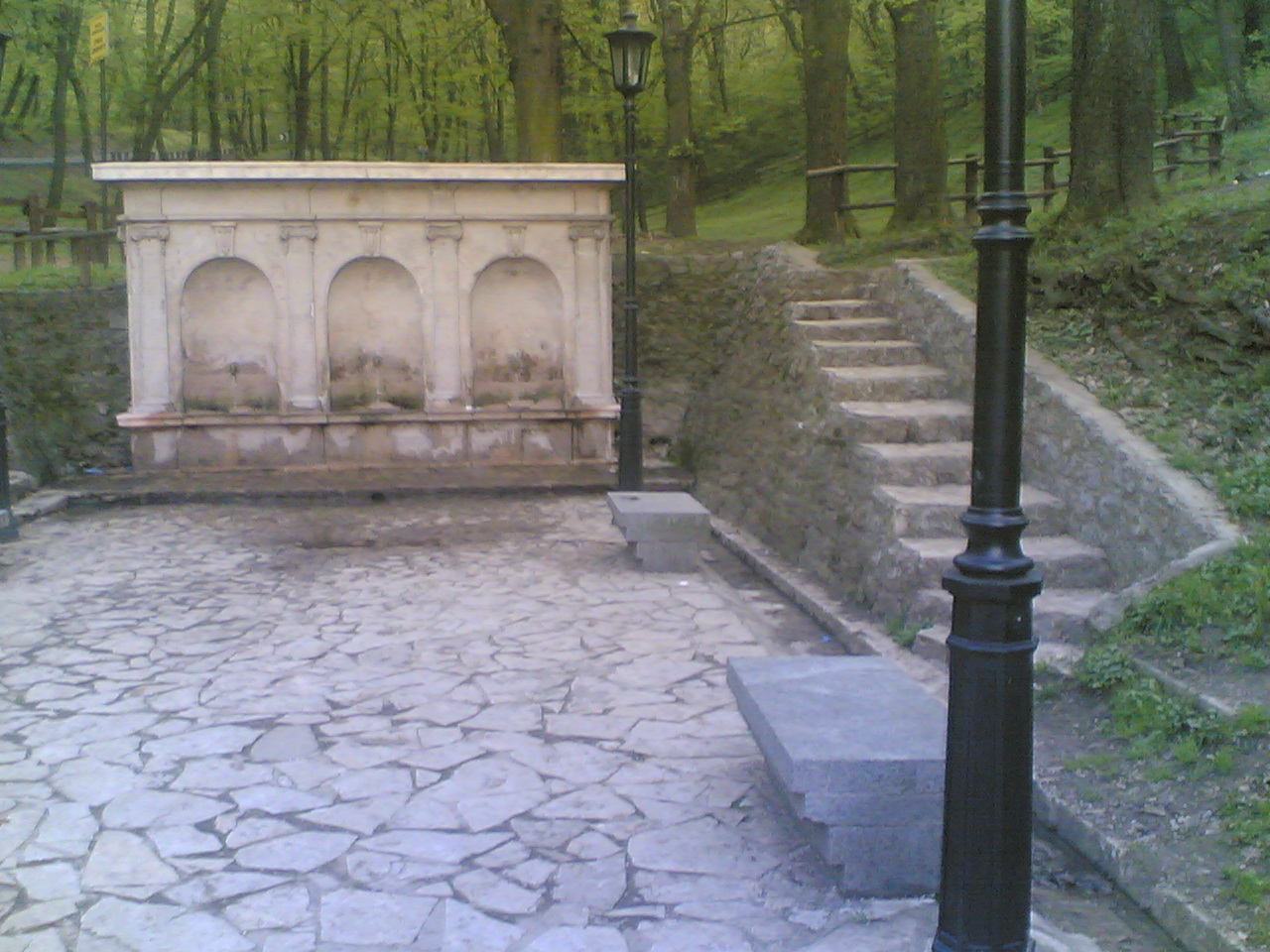 Сликао JustUser 14. априла 2006. на Кошутњаку. Хајдучка чесма. Стављено у јавно власништво.